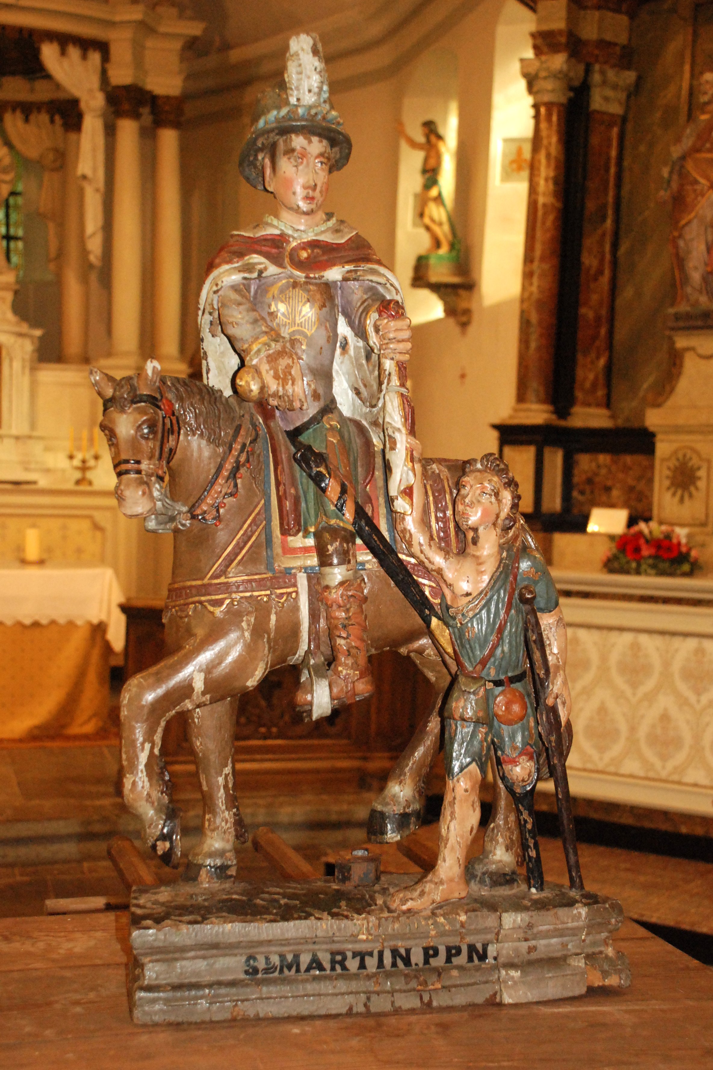 Belgique - Brabant wallon - Chapelle Saint-Martin de Lillois-Witterzée - Statue de saint Martin